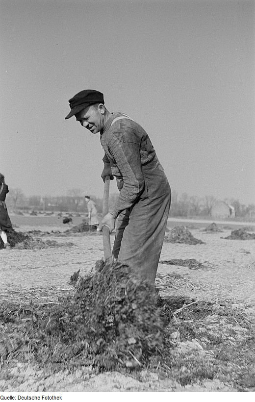 Original image description from the Deutsche Fotothek Genossenschaftsbauer Grygo beim Dungbreiten